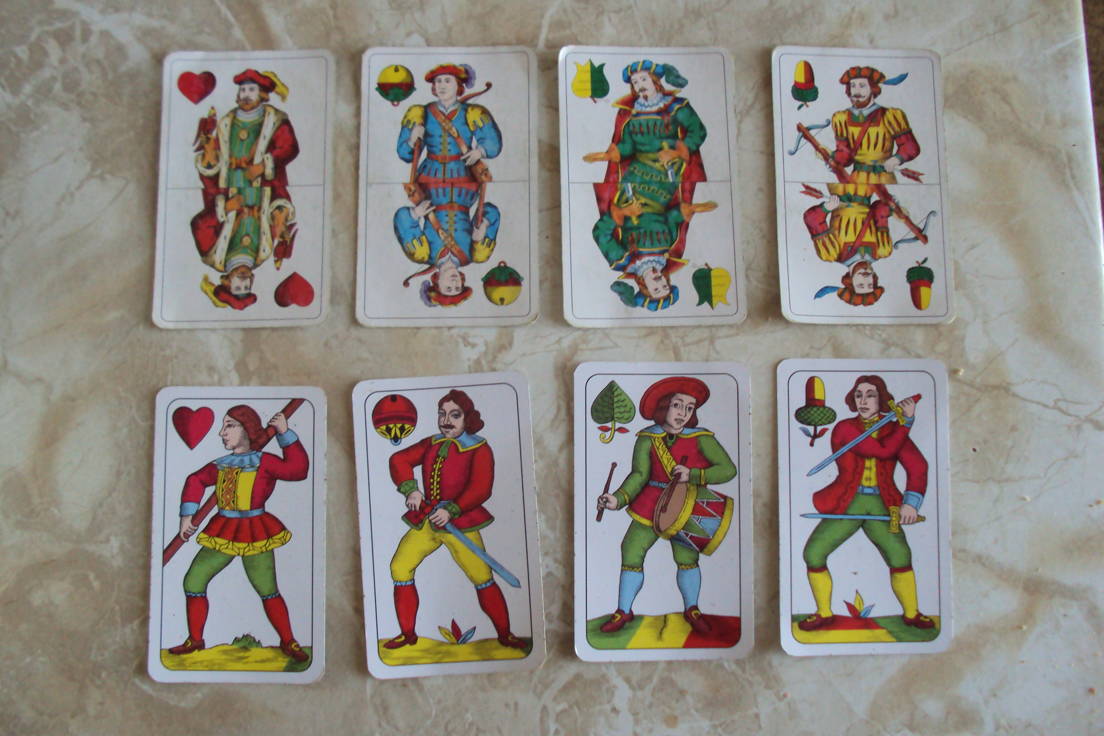 Karetní svršky jedno i dvouhlavé